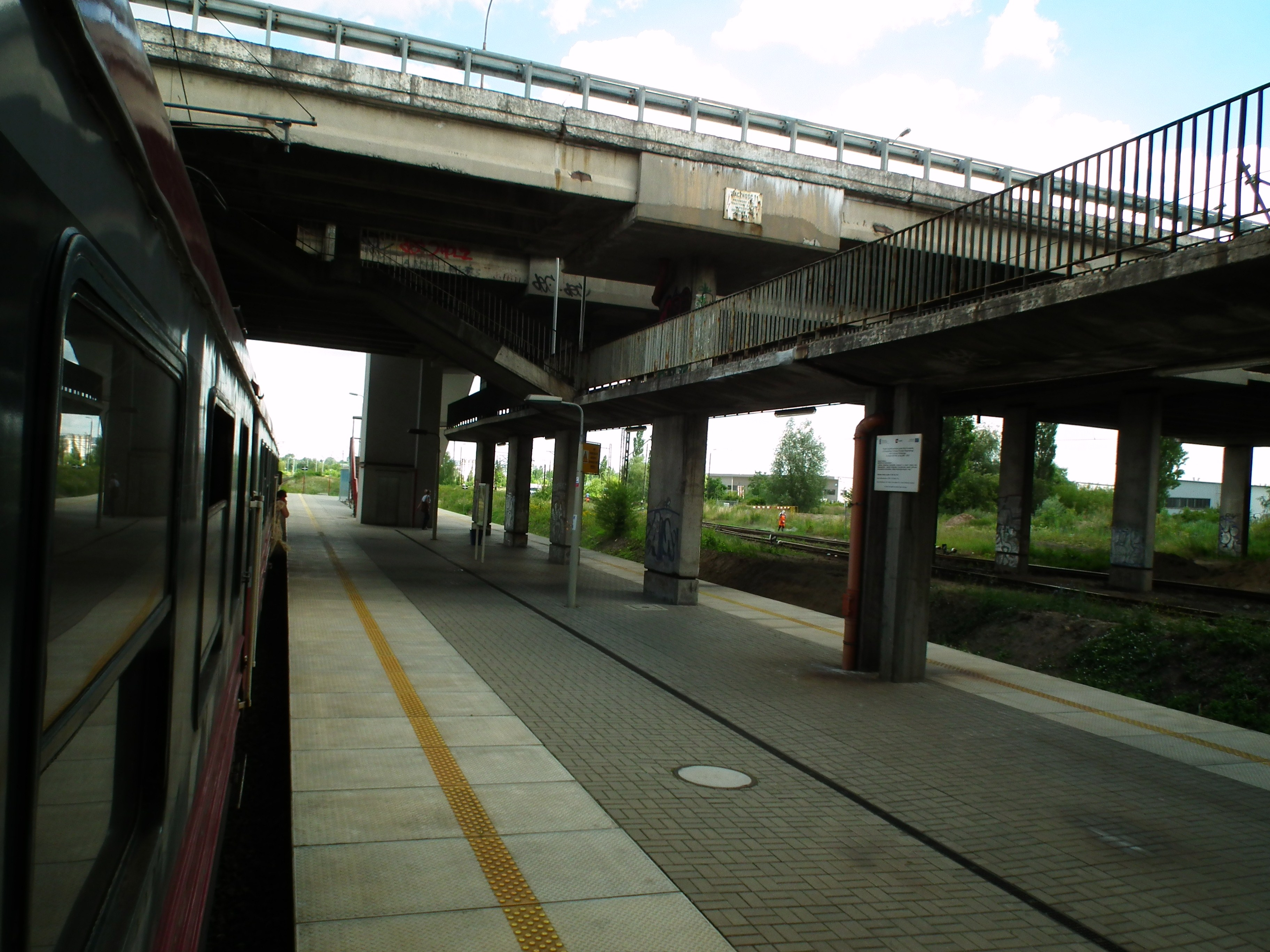 Przystanek kolejowy Łódź Dąbrowa.